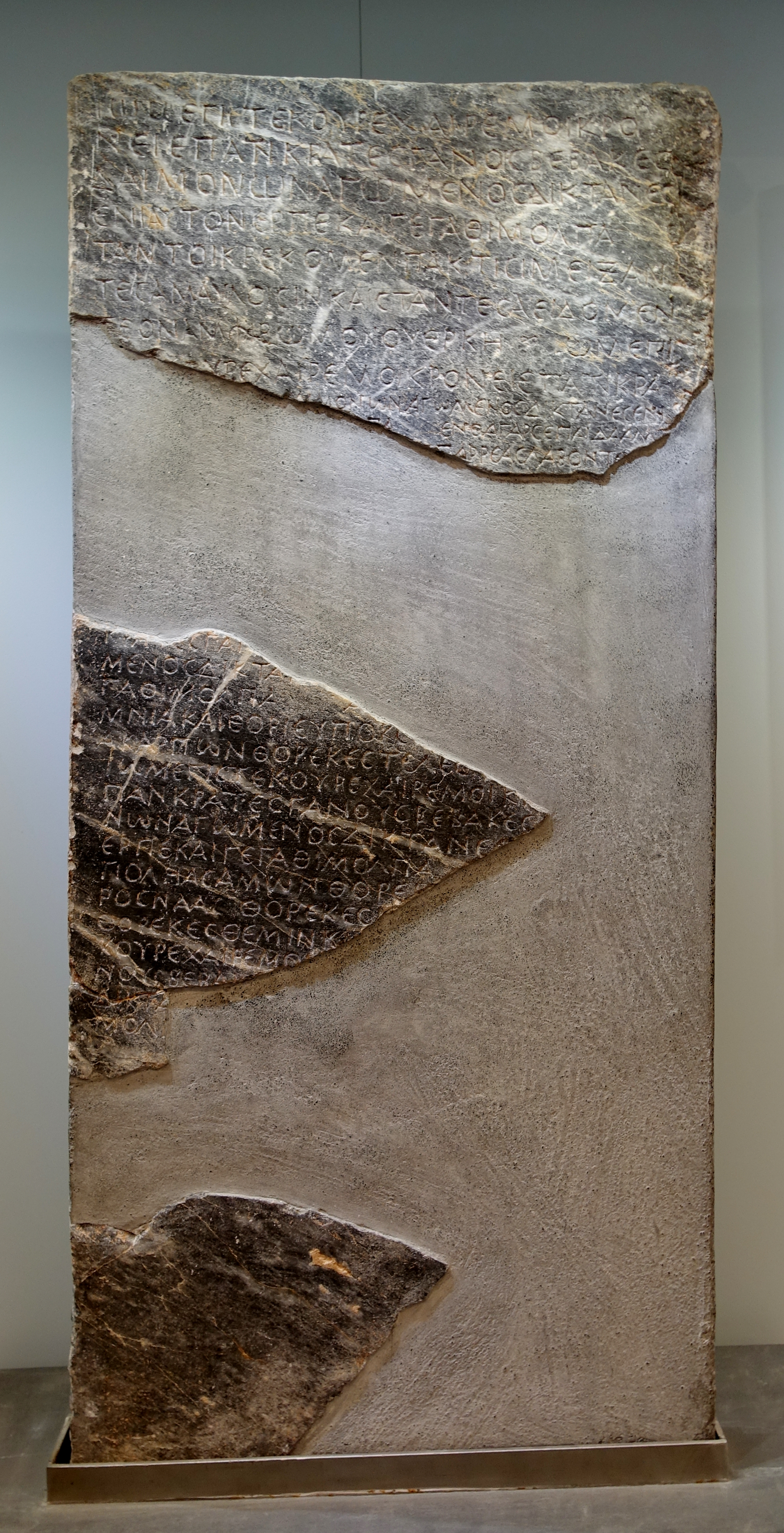 Hymnus der Koureten, auch Hymnus an den Diktäischen Zeus, Inschrift aus dem 3. Jahrhundert aus der Ausgrabungsstätte von Roussolakkos, Archäologisches Museum von Iraklio, Kreta, Griechenland